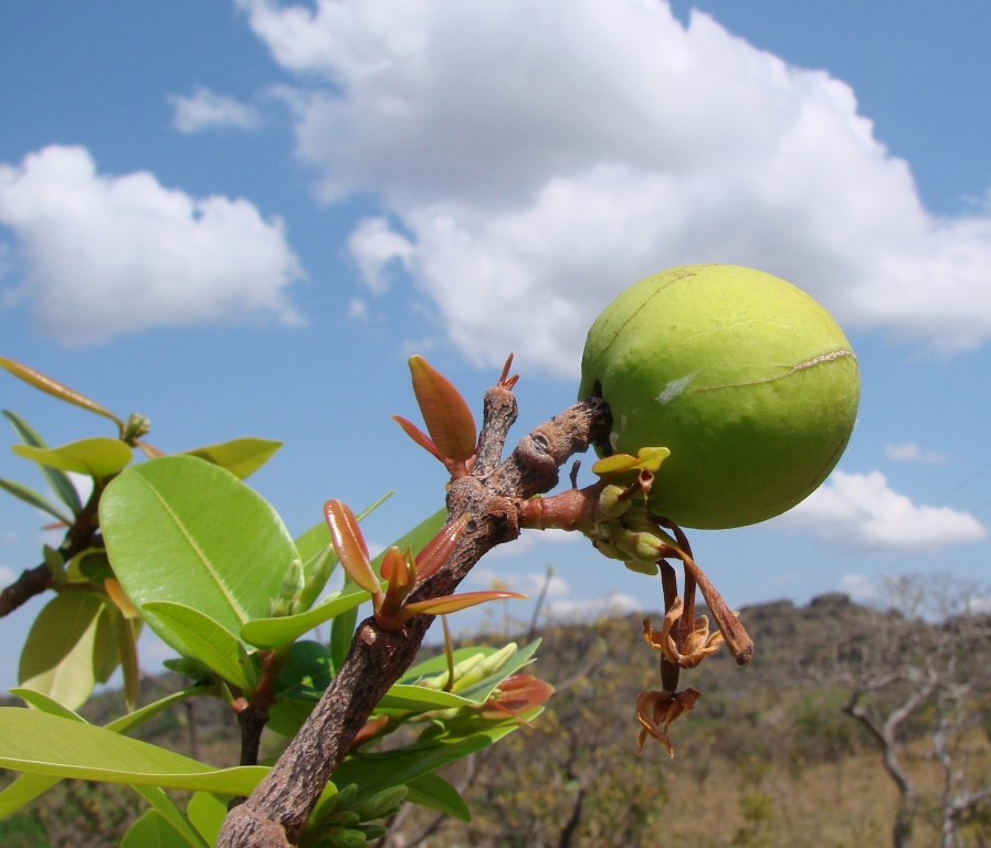 Hancornia speciosa - APOCYNACEAE - Jardim Botânico de Brasília - DF - Brasil